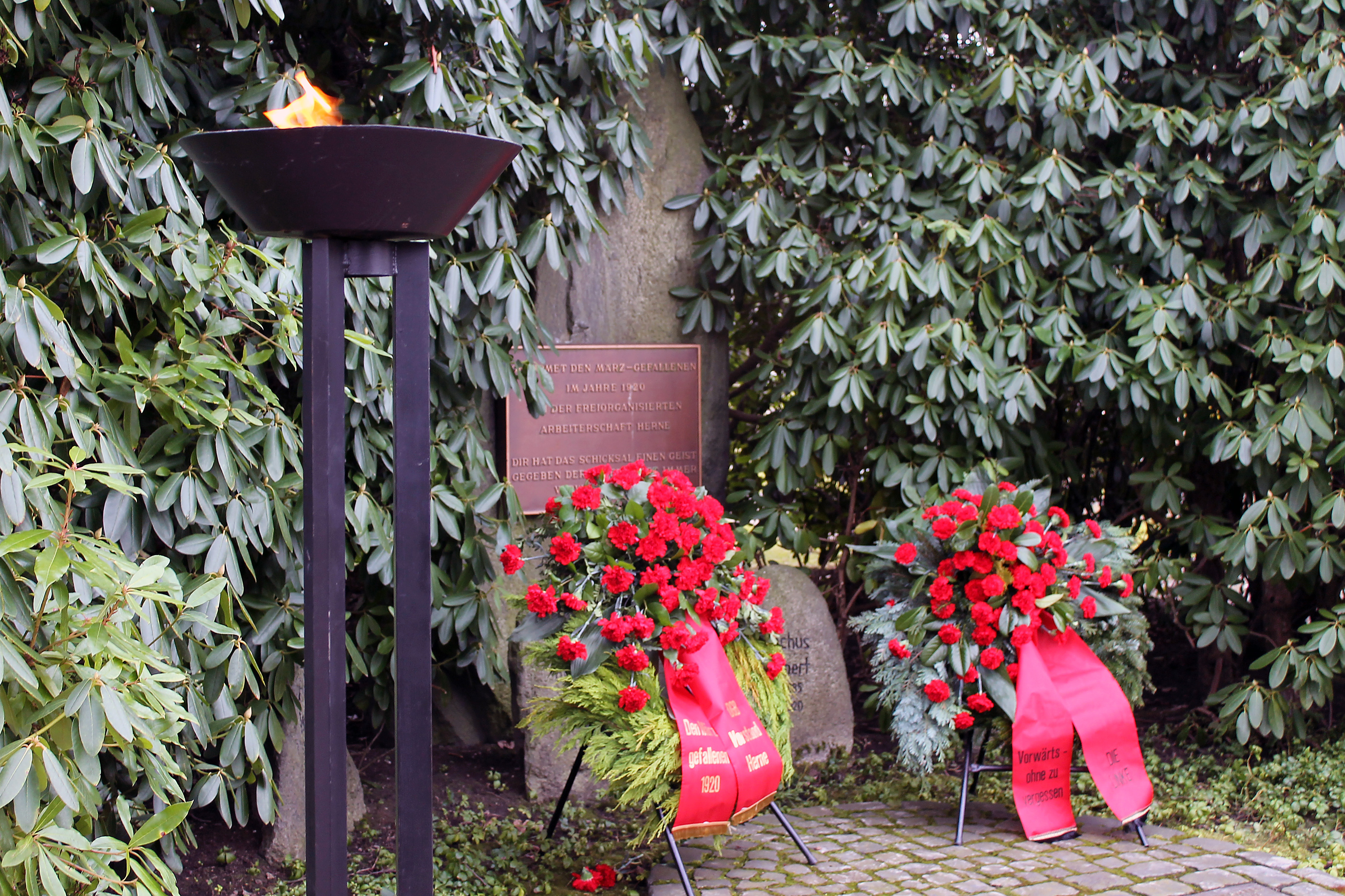 Gedenkstätte für die Opfer des Generalstreiks gegen den Kapp-Putsch von 1920 auf dem Herner Friedhof an der Wiescherstraße. Es wurden zwei Kränze zum Gedenken niedergelegt und zwei Feuerschalen aufgestellt.